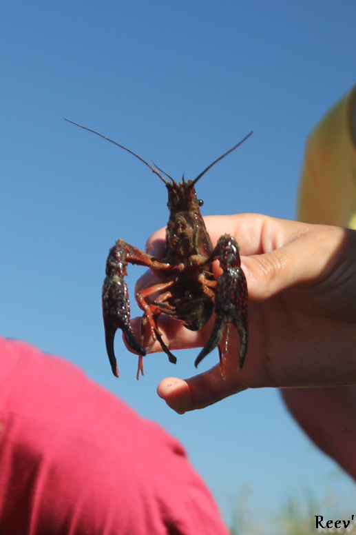 Cette espèce invasive est pêchée pendant l'été aux Marais du Vigueirat afin d'essayer de limiter son expension.